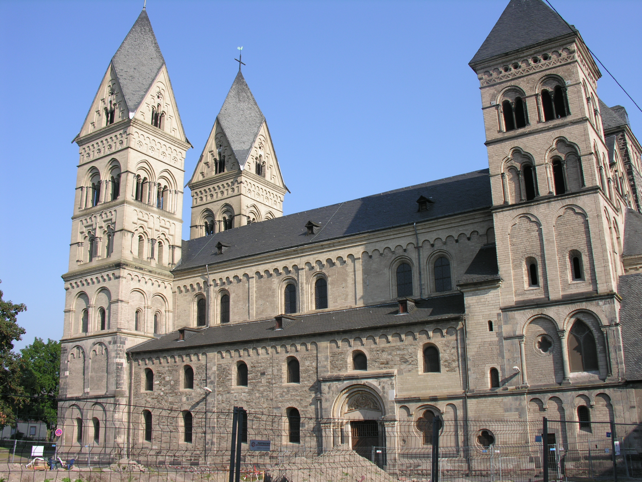 Andernach 04